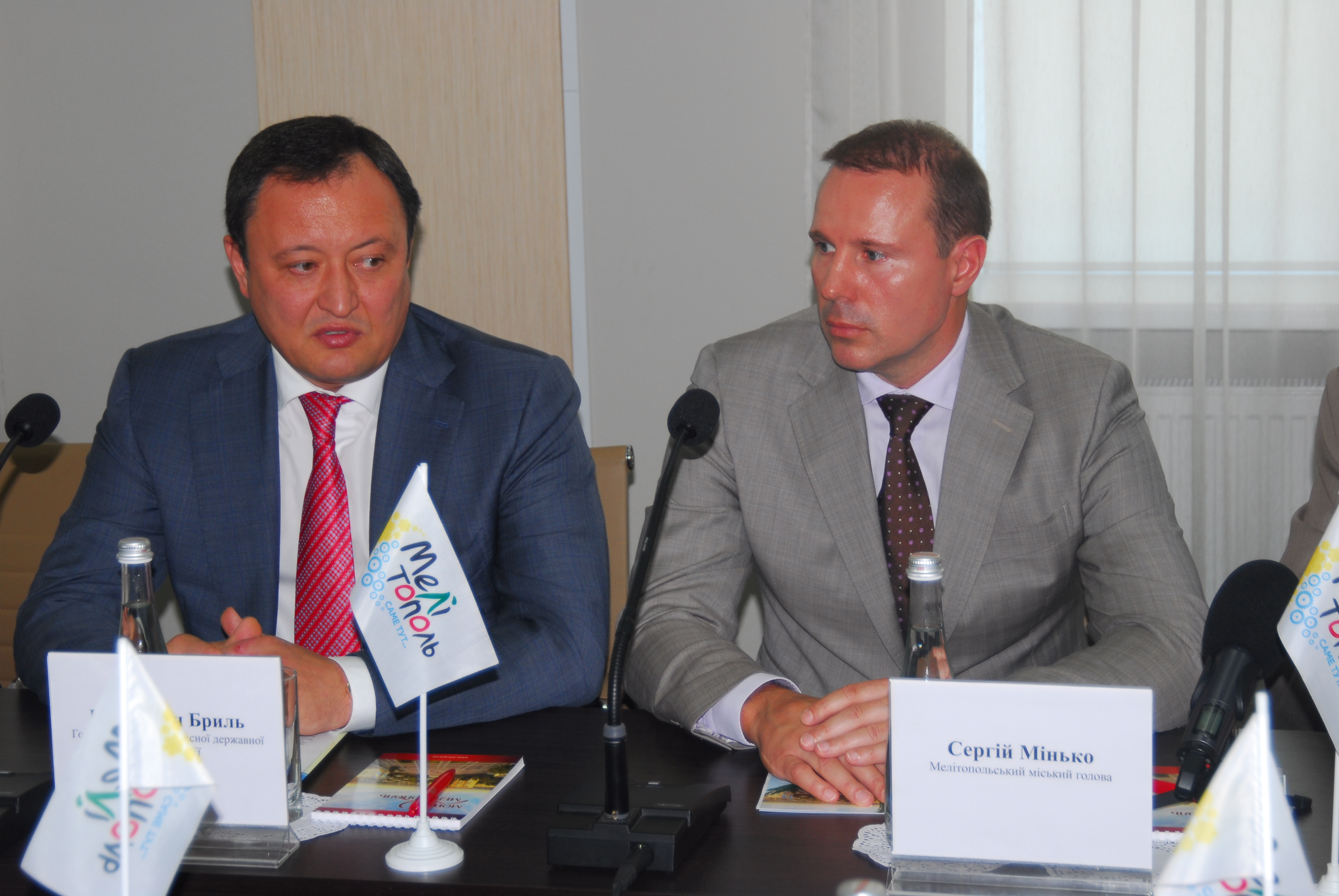 Мелитополь